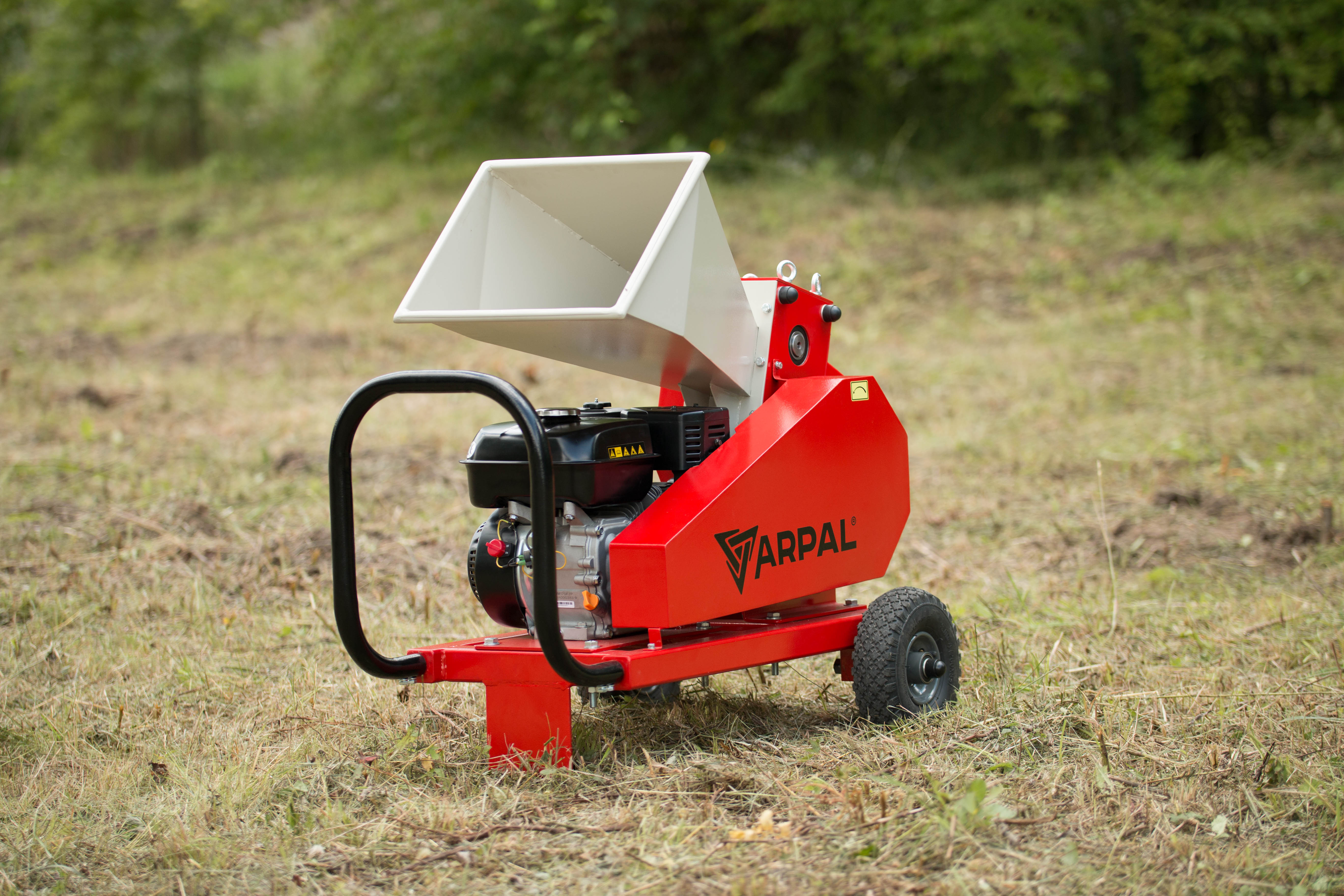 Садовий подрібнювач гілок АРПАЛ АМ-60БД, здатен переробляти гілки та деревні відходи діаметром до 60 мм.